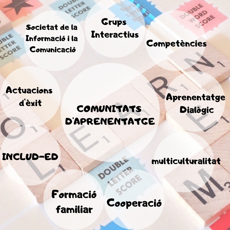 El nucli de la imatge són les Comunitats d'Aprenentatge i els núvols que la rodeja són conceptes que formen part d'aquest projecte com: actuacions d'èxit, INCLUD-ED, formació familiar, cooperació, multiculturalitat, aprenenetatge dialògic, competències, grups interactius, Societat de la Informació i la Comunicació, etc.